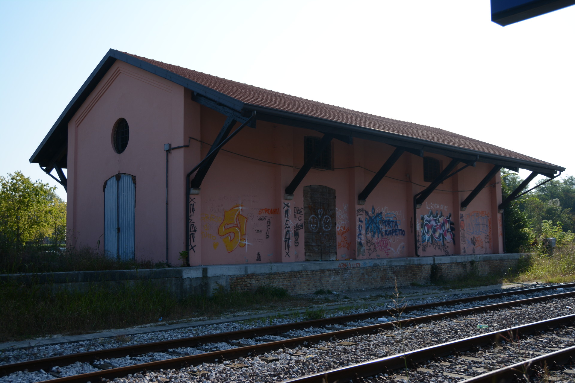 Deposito in disuso della stazione ferroviaria di San Vito al Tagliamento